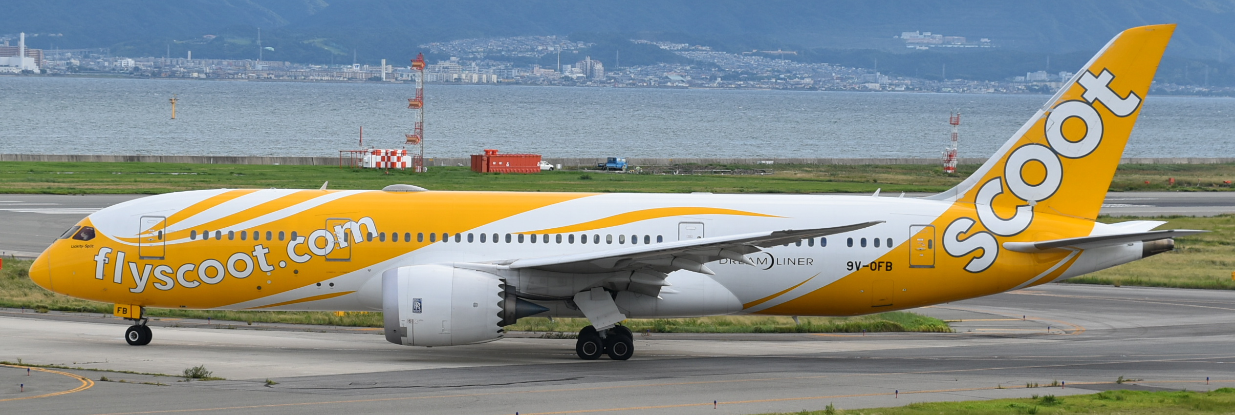 Boeing 787/8 of Scoot at Osaka Kansai-KIX, Japan, 17/09/16.